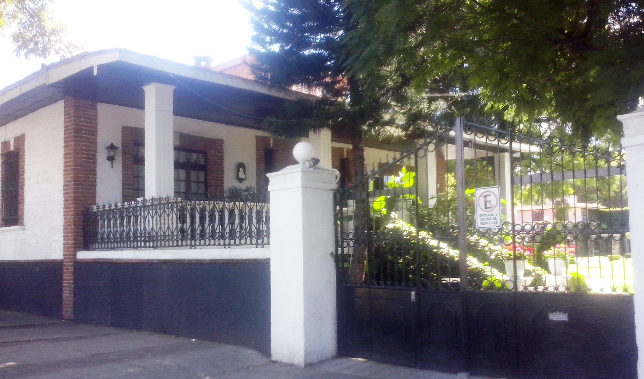 Casa ubicada en Avenida Revolución y 16 de Enero en Pachuca de Soto, Hidalgo en México. Residencia que fue sede del viceconsulado honorario de Inglaterra en México, representado por Federico Harold Pengelly.